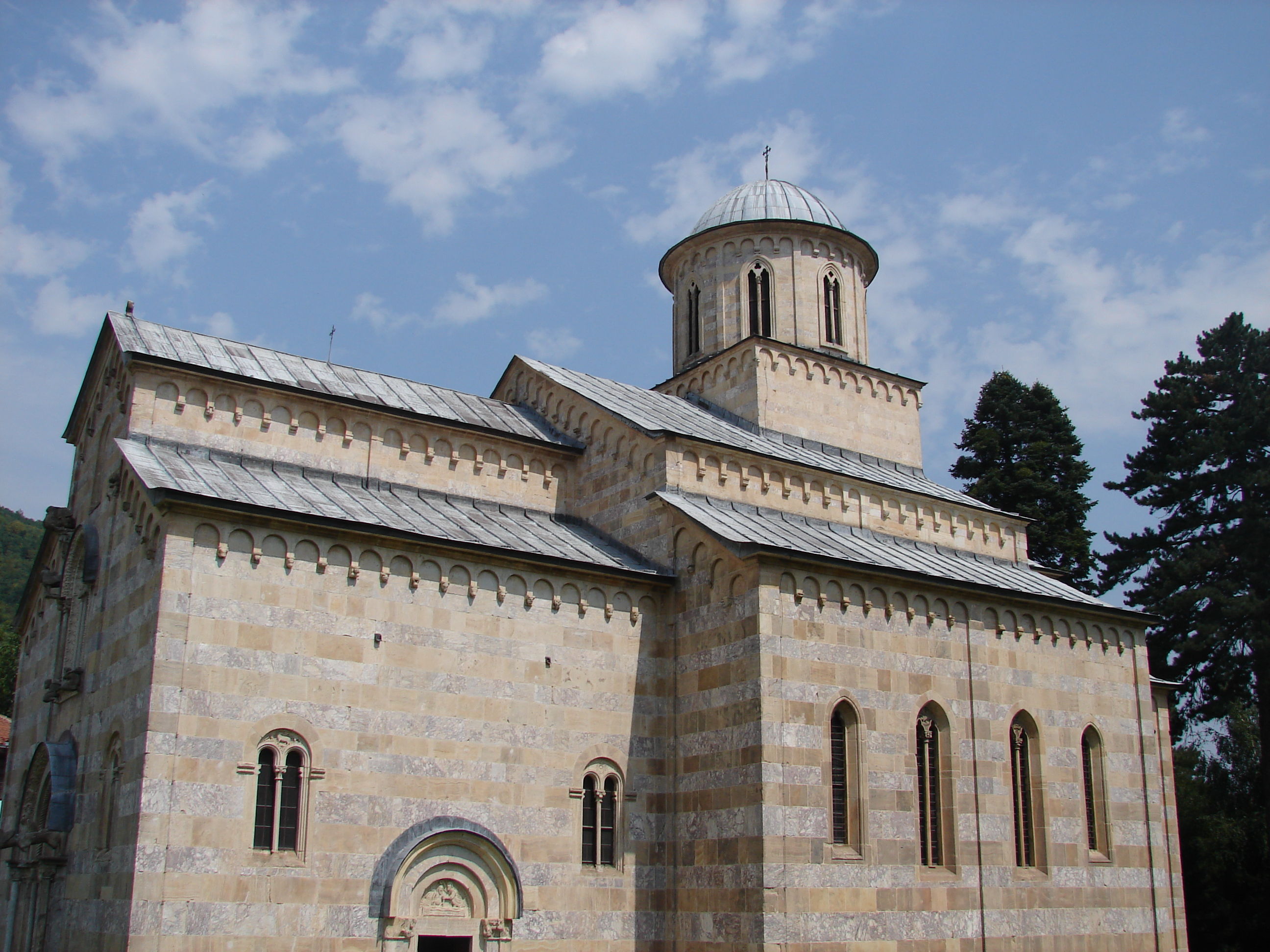 Visoki Dečani monastery.